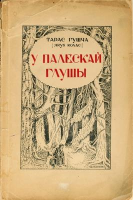 Беларуская (тарашкевіца): Вокладка першага выданьня першай кнігі Трылёгіі «На ростанях» (Вільня, 1923)